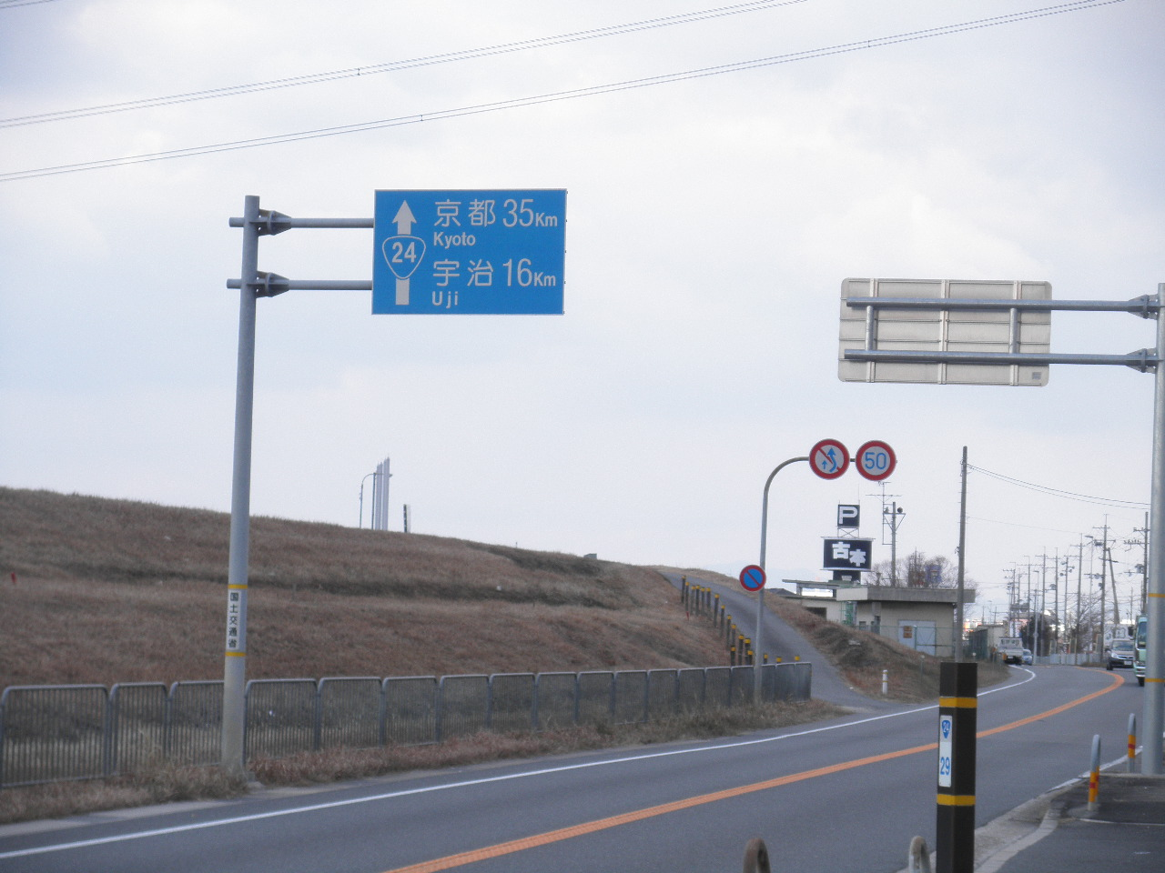 京都府木津川市山城町椿井水垣内 国道24号